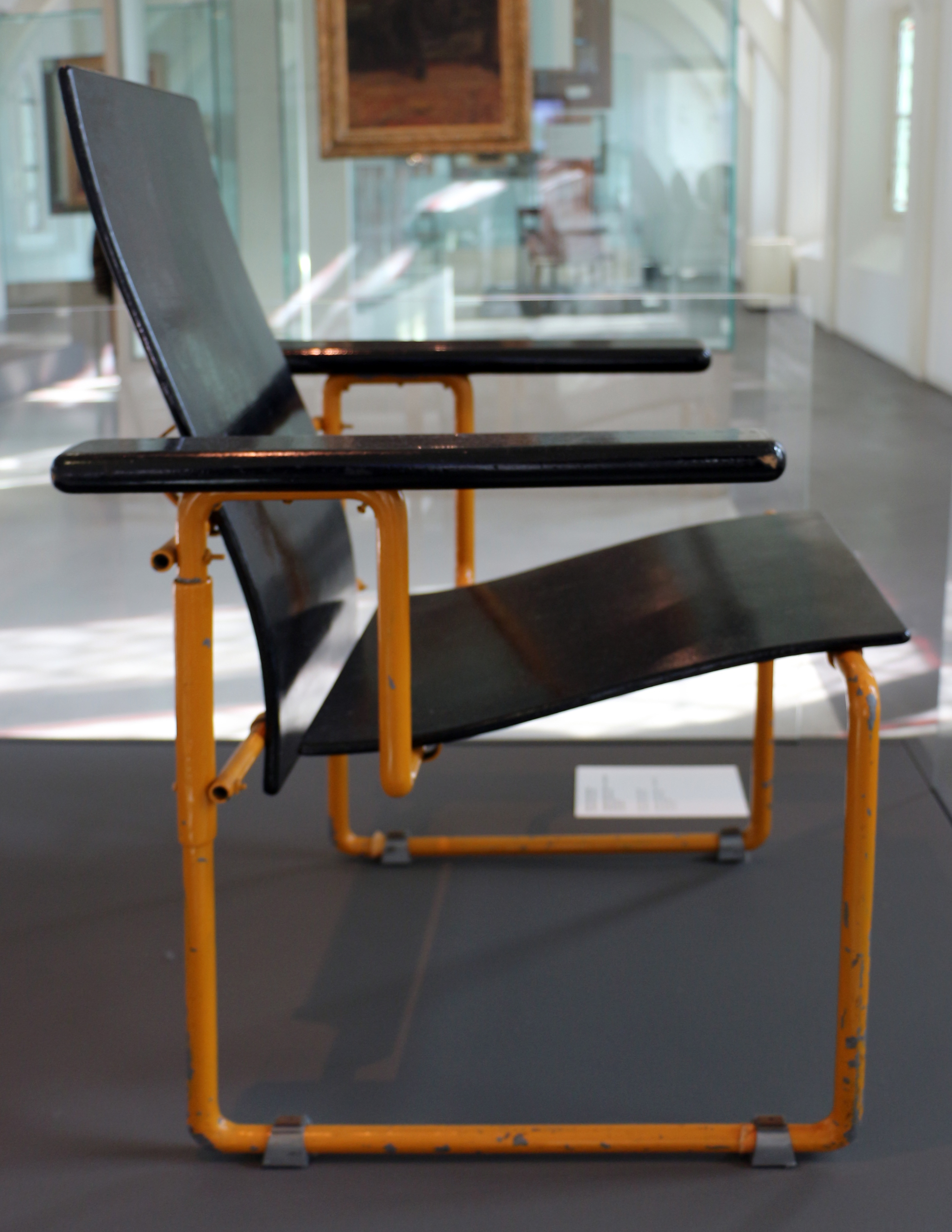 Gerrit rietveld, poltrona wouter paap, 1928-30 ca. 01.JPG